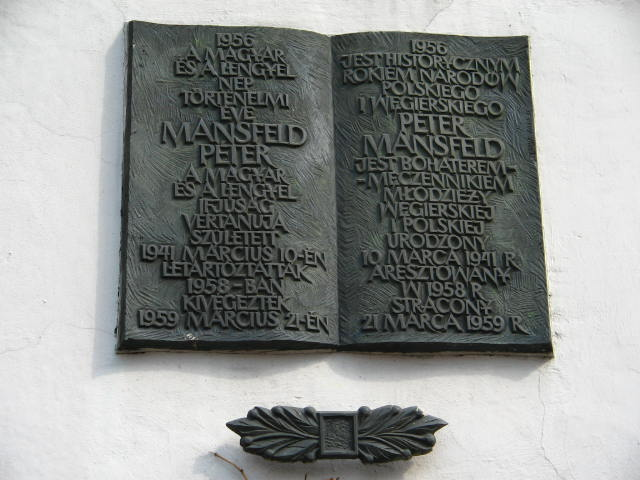 Tablica pamiątkowa w Poznaniu na ulicy Petera Mansfelda.